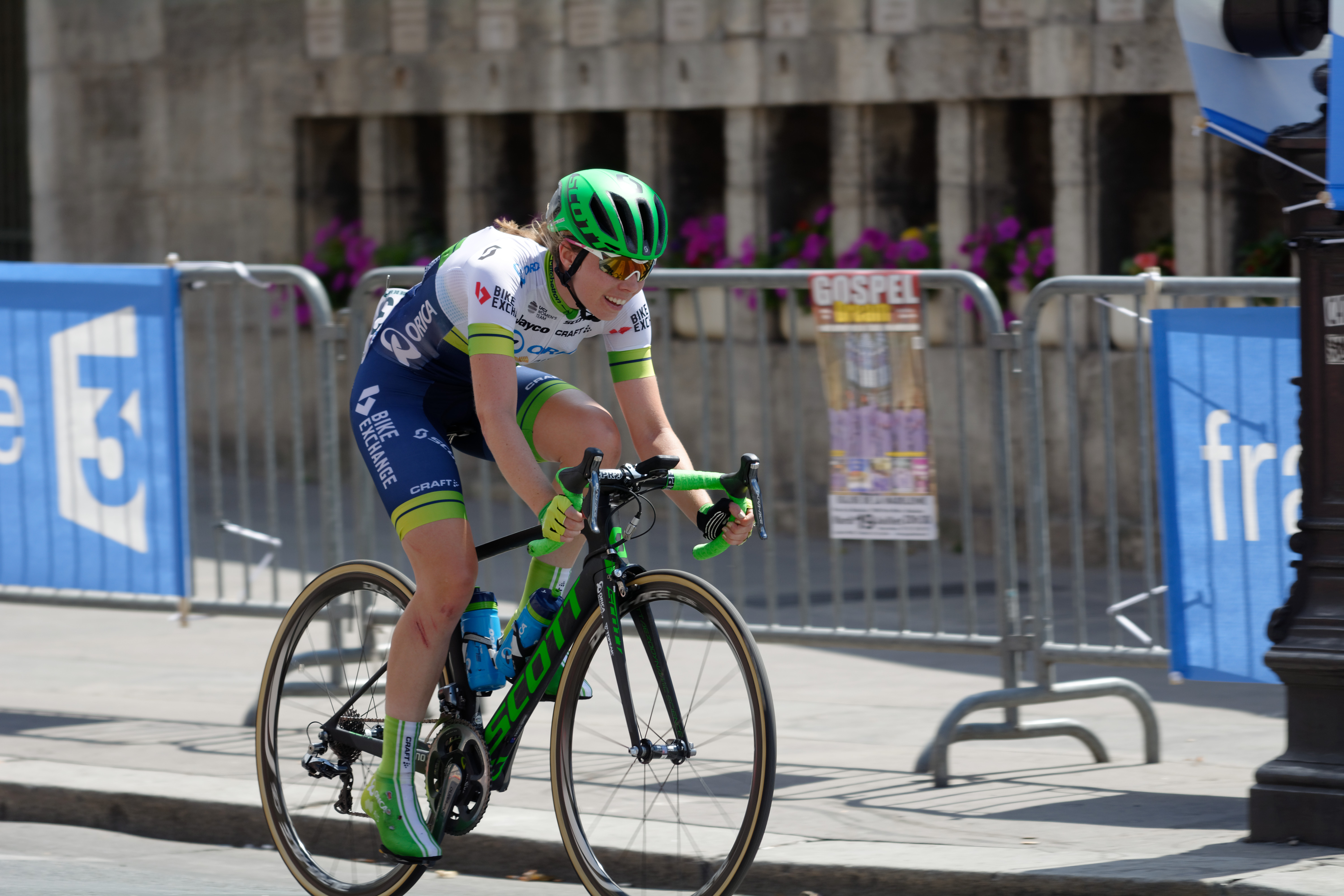 D71_9360_DxO